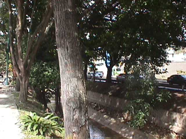 Quebrada La Guairita a nivel de la Ubanizacion La Trinidad - Municipio Baruta, Estado Miranda - Venezuela